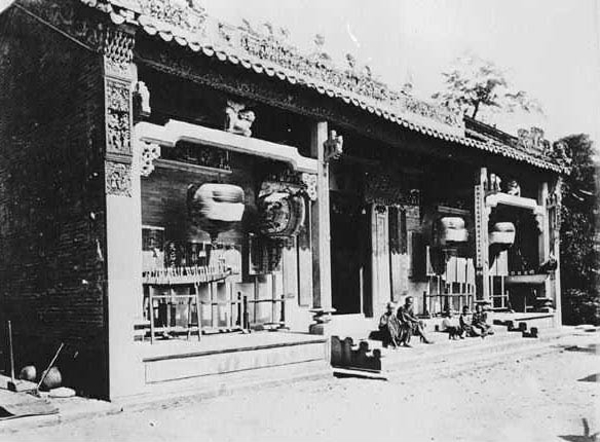 中文（香港）: 1880年香港銅鑼灣天后廟。